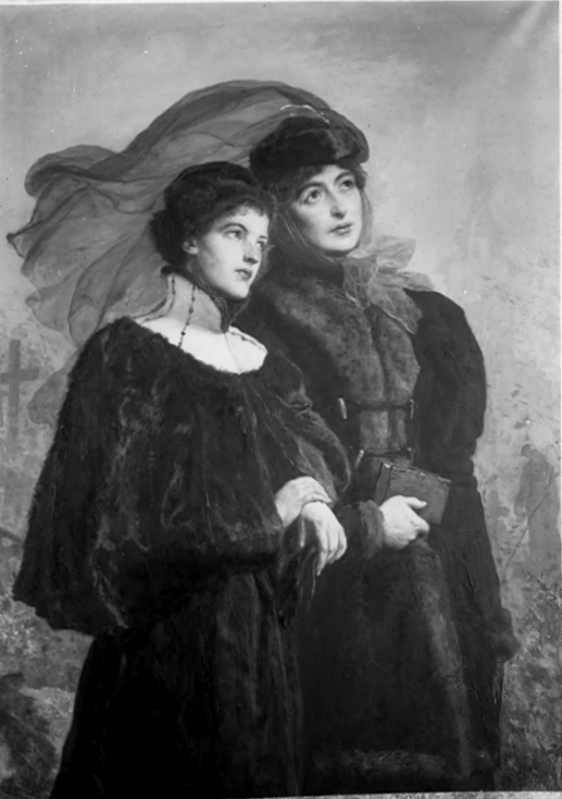 Dwie siostry, Polska i Litwa